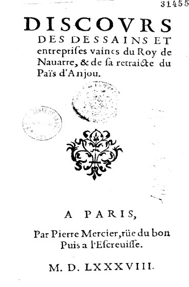 abbaye de Bourgueil Anjou